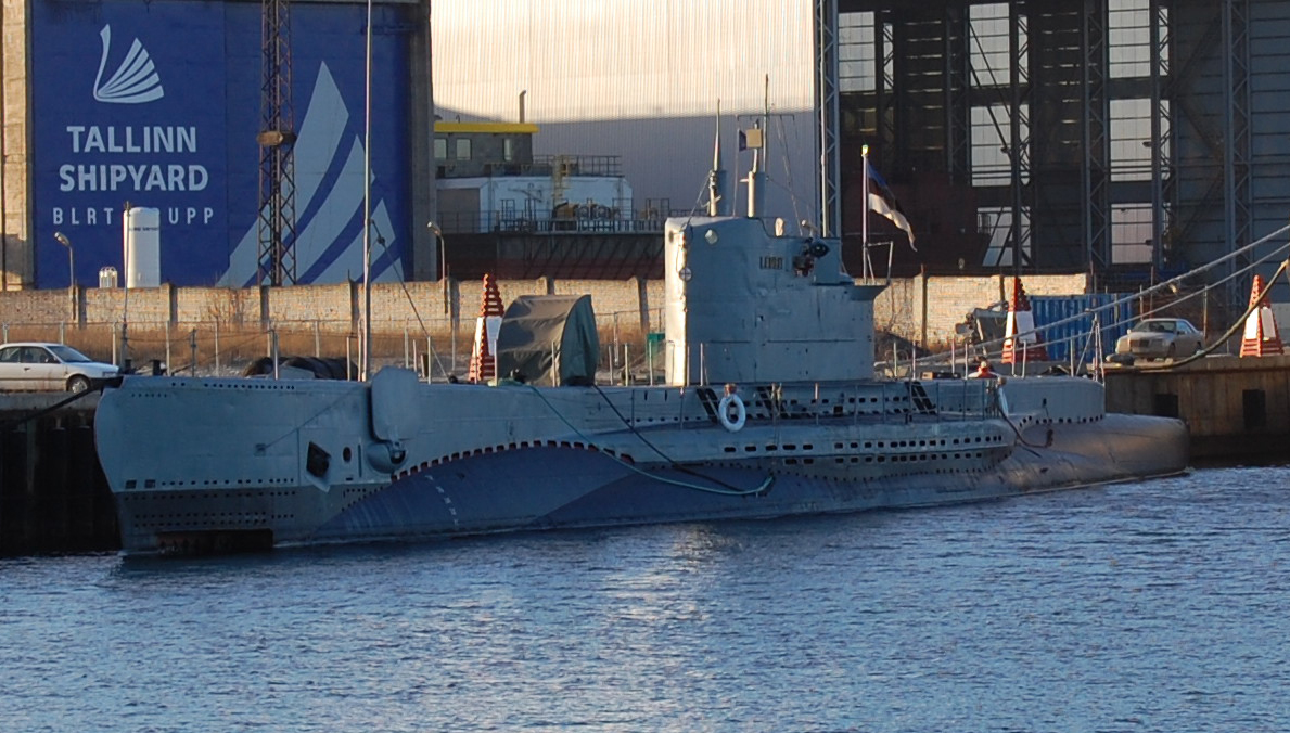 Estonian submarine Lembit in Tallinn as a museum